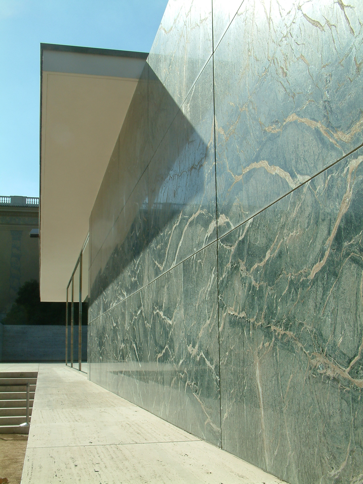 Barcelona Pavillion - Mies van der Rohe